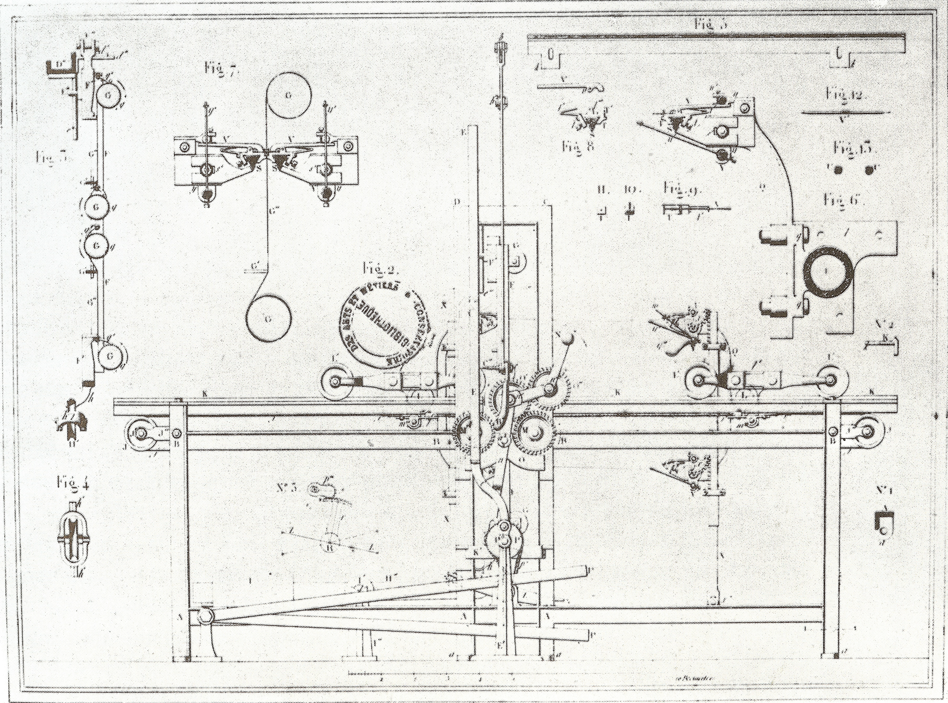 Konstruktionszeichnung der von Josua Heilmann entwickelten Handstickmaschine - Seitenriss. Qualitativ noch nicht ausgereift, daher noch nicht sehr erfolgreich